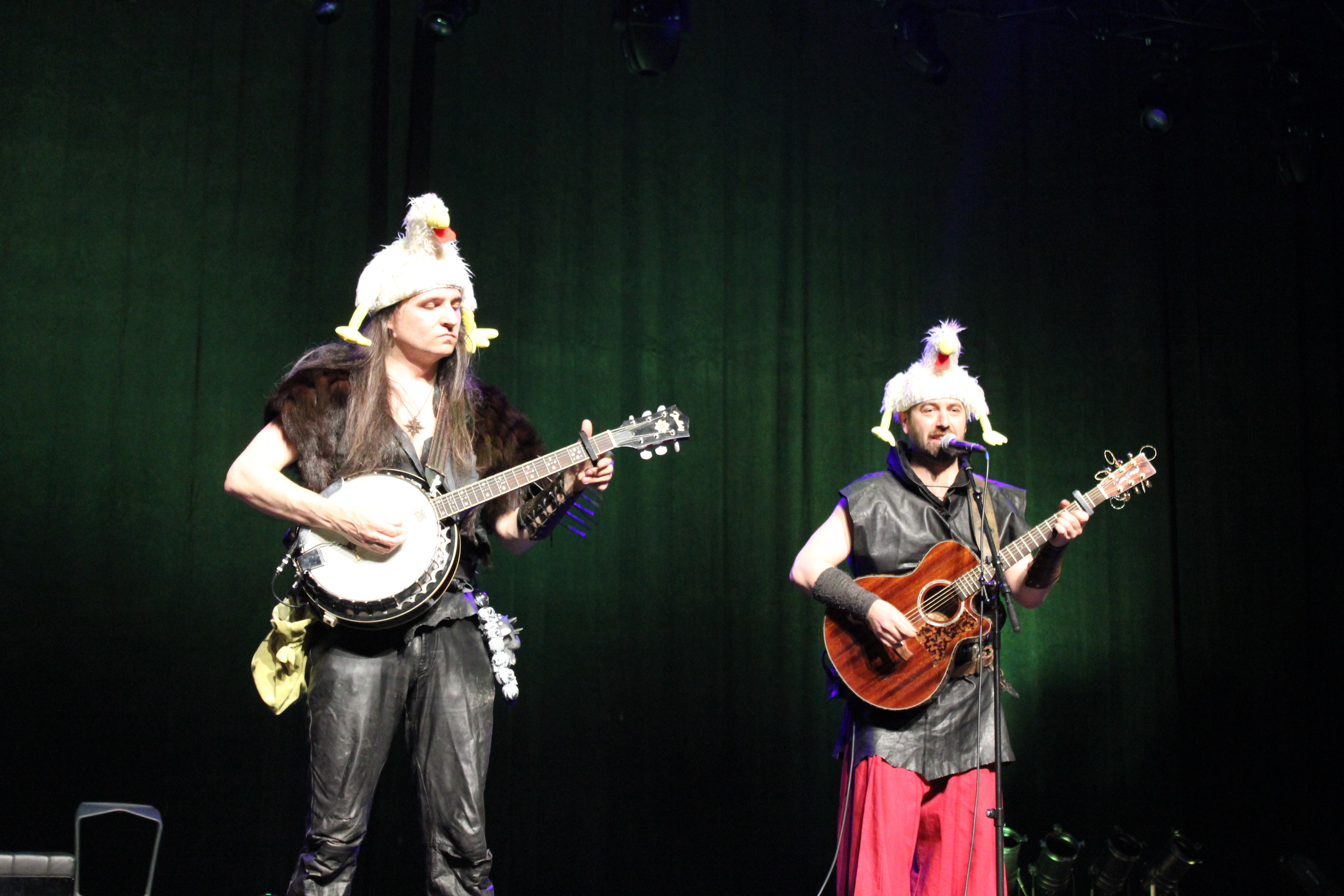 Le Naheulband en concert à l’Auditorium Stravinski à Montreux (Suisse), pendant Polymanga, le 20 avril 2014.